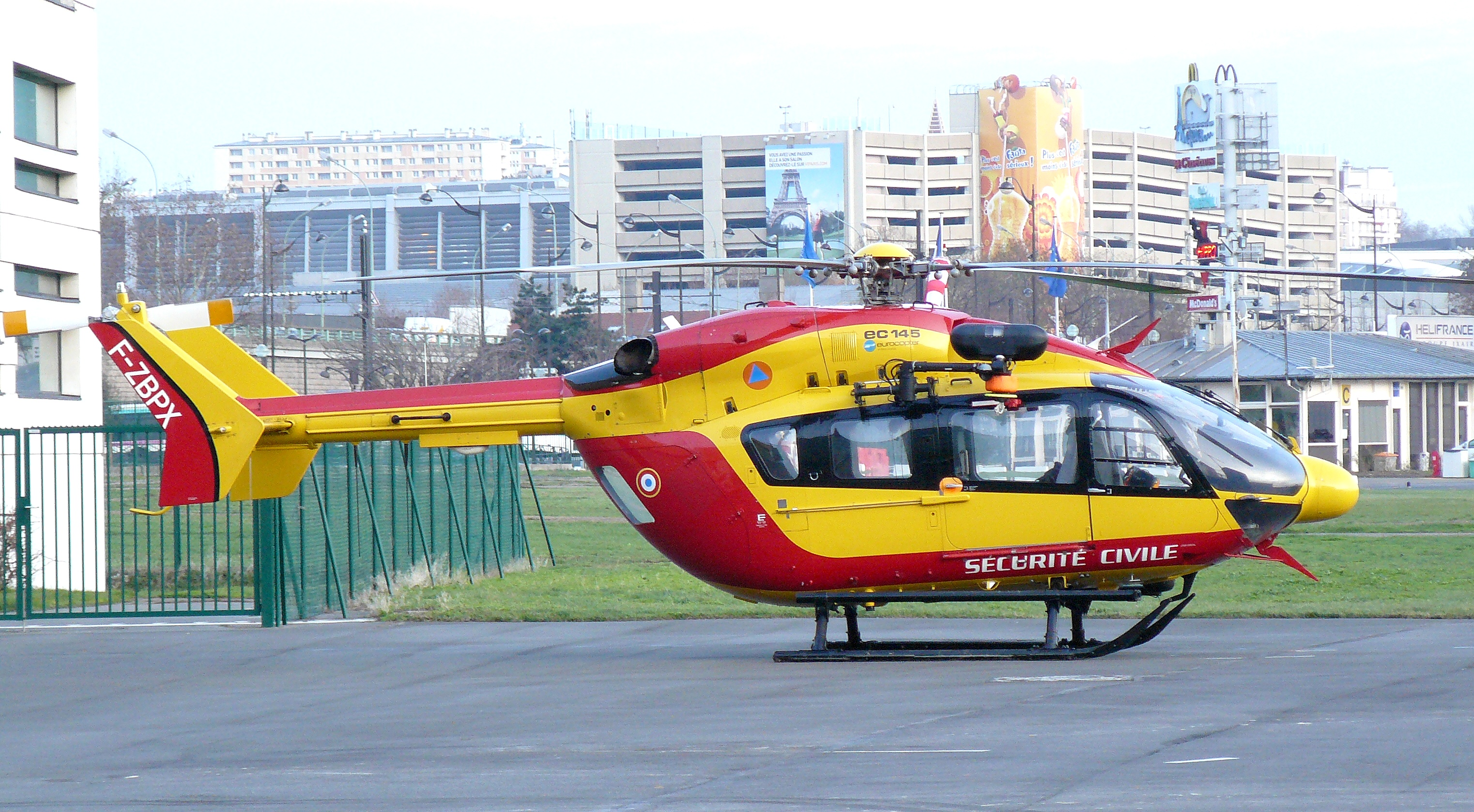 Hélicoptère Eurocoptère EC-145 de la sécurité civile française - IMM F-ZBPX - au sol à l'héliport de Paris.